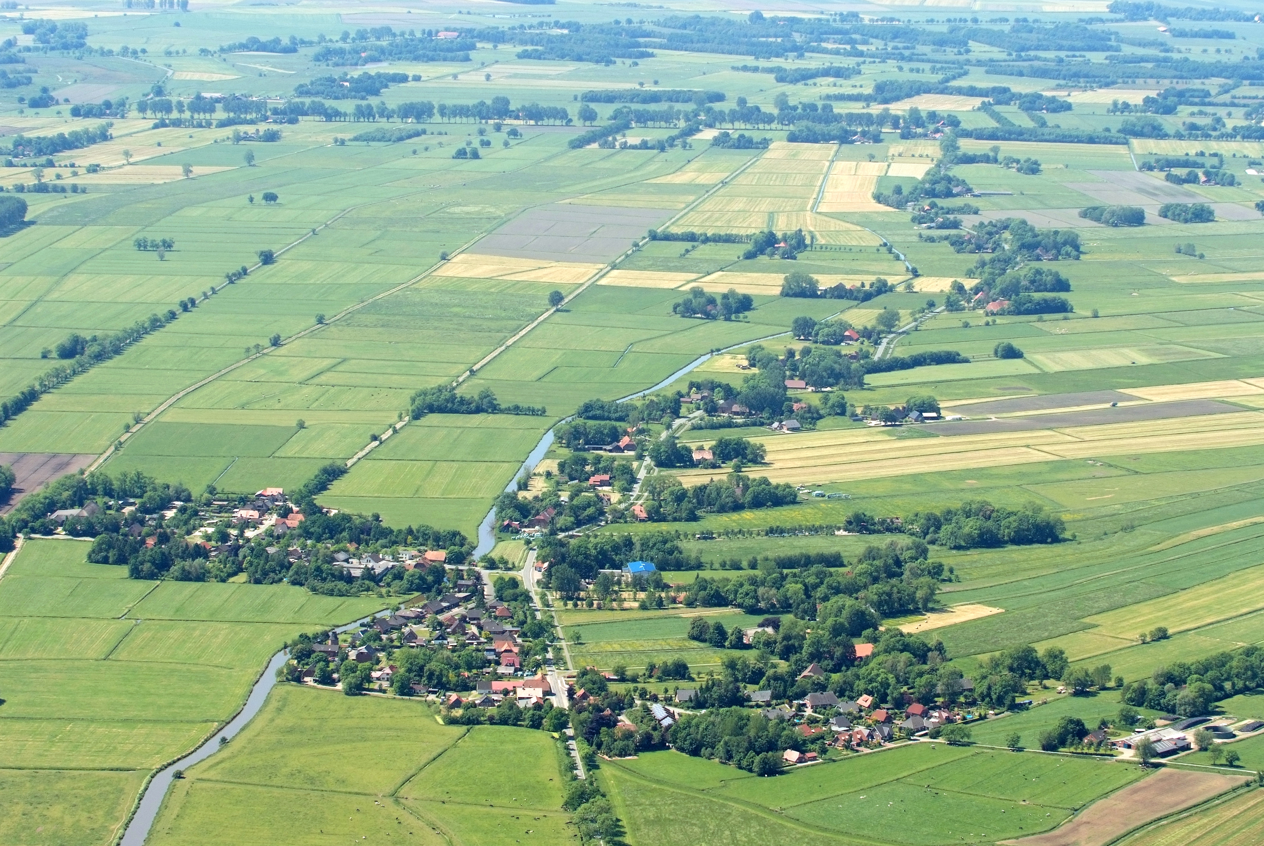 Neustadt in der Gemeinde Jade Fotoflug vom Flugplatz Nordholz-Spieka über Cuxhaven und Wilhelmshaven